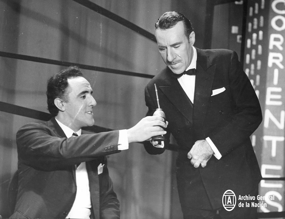 Edmundo Rivero junto al animador Adolfo Garcia Grau, durante su actuación en el programa "Tango", Canal 7, año 1962. Documento fotográfico. Inventario 280592.